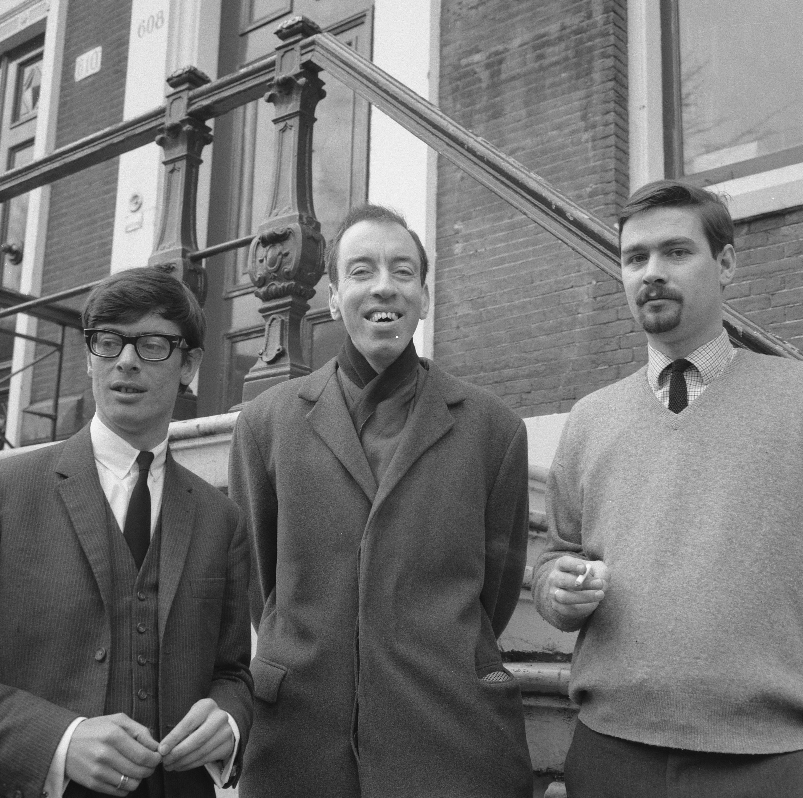 Collectie / Archief : Fotocollectie Anefo Reportage / Serie : [ onbekend ] Beschrijving : Pand Keizersgracht, v.l.n.r. Jansen, Polak en Van Gennep Datum : 26 maart 1966 Locatie : Amsterdam, Noord-Holland Trefwoorden : panden Fotograaf : Evers, Joost / Anefo Auteursrechthebbende : Nationaal Archief Materiaalsoort : Negatief (zwart/wit) Nummer archiefinventaris : bekijk toegang 2.24.01.03 Bestanddeelnummer : 918-9677 Reacties Geplaatst door Geertje op 26 april 2015 - 16:48. Uitgeverij Polak en Van Gennep aan de Keizersgracht 608 Persoonsnamen: R.O. (Rob) van Gennep; J. (Jaap) Jansen; J.B.W. (Johan) Polak